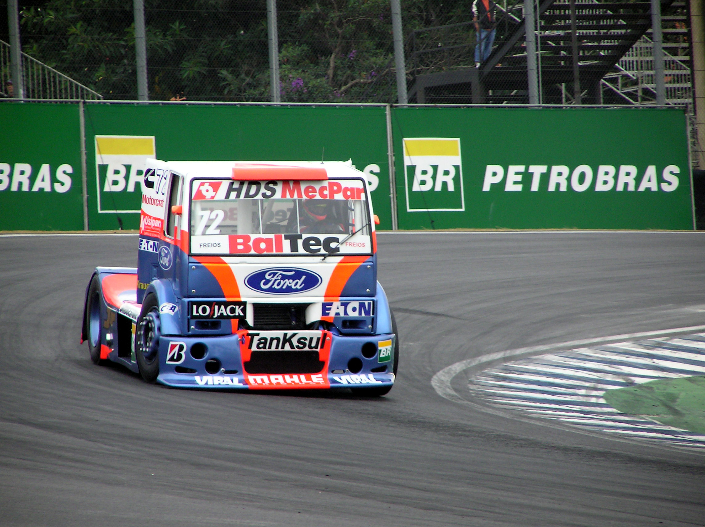 Fórmula Truck 2006 Rd.3 Interlagos: #72 Djalma Fogaça